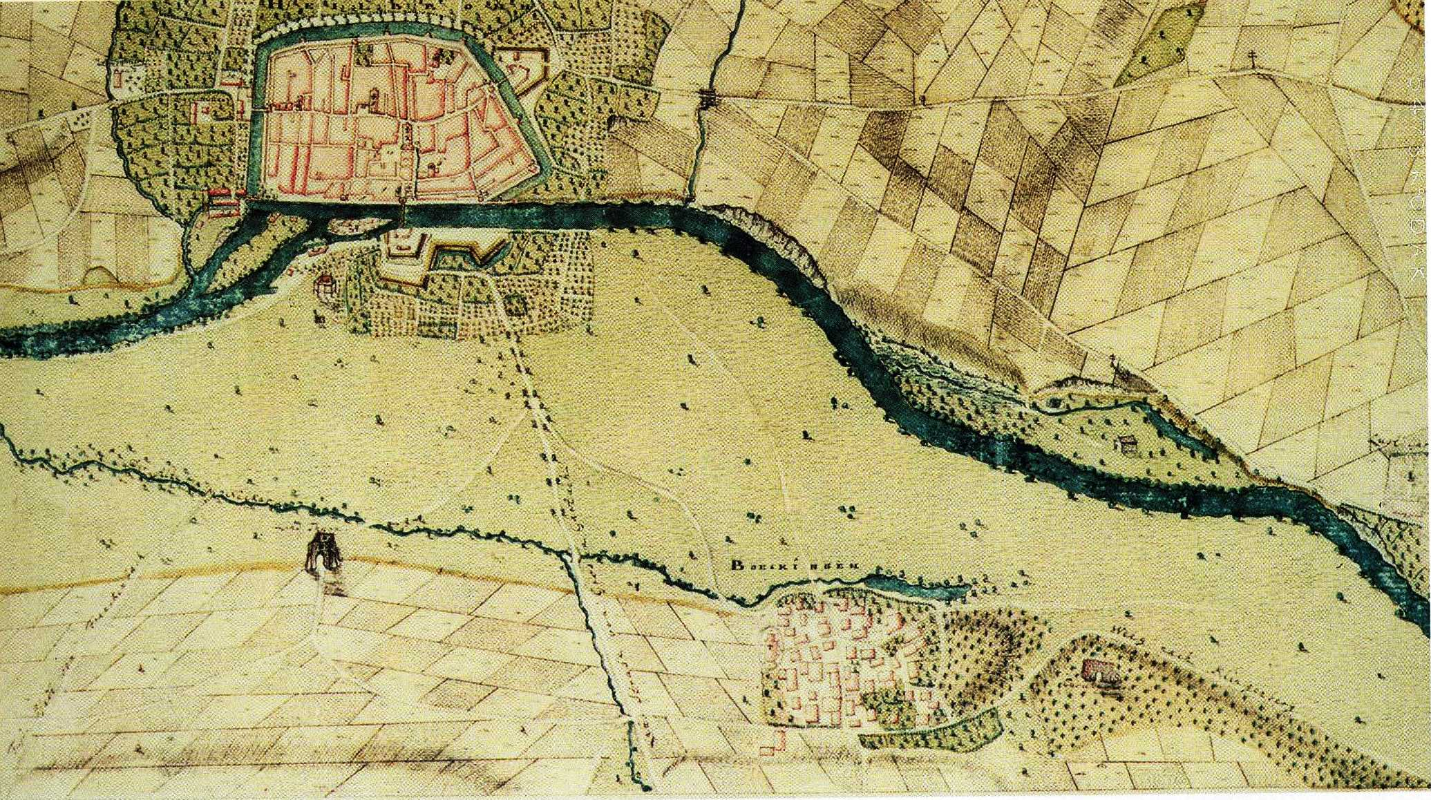 Heilbronn mit Böckingen Feldlagers bey Böckingen 1689